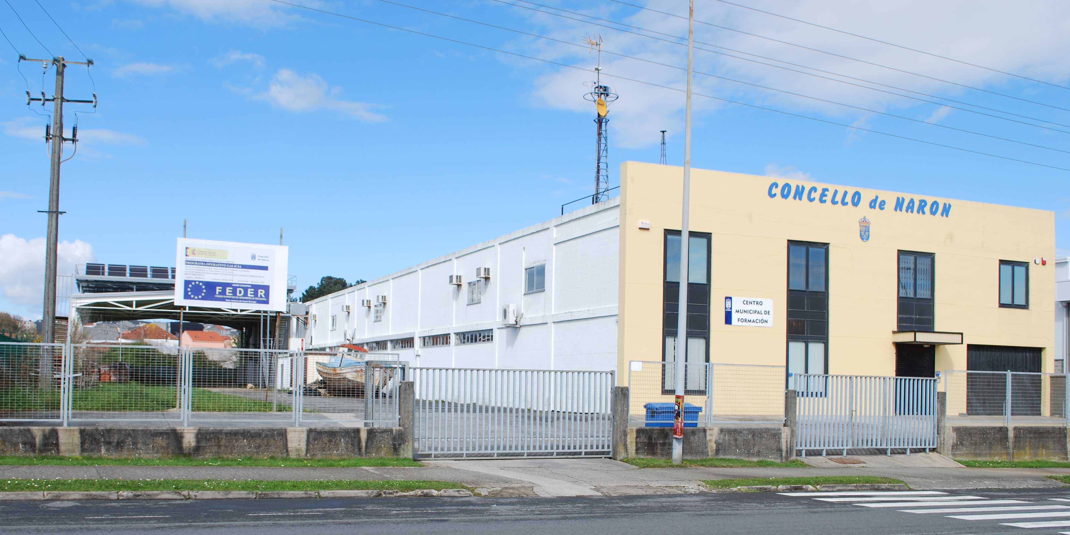 Centro de formación Narón A Gándara Fenya A Coruña Galiza Spain